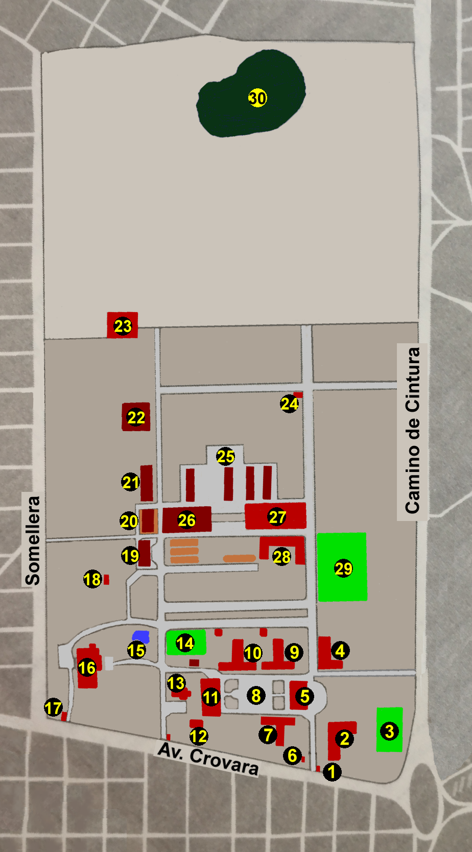 Mapa del Regimiento de Infantería Mecanizado 3 de La Tablada en 1989. Fuente: La Tablada: a vencer o morir, de Felipe Celesia y Pablo Waisbarg, Aguilar, 2013. Referencias: 1) Puesto Nº 1. 2) Guardia y Calabozos. 3) Cancha de fútbol. 4) Enfermería. 5) Plana Mayor. 6) Baño. 7) Compañía Comando y Servicios. 8) Plaza de Armas. 9) Compañía "A". 10) Compañía "B". 11) Casino de Suboficiales. 12) Capilla. 13) Comedor. 14) Cancha de fútbol. 15) Piscina. 16) Casino de Oficiales. 17) Puesto Nº 3. 18) Puesto Somellera. 19) Garage. 20) Taller. 21) Caballeriza. 22) Polígono de Tiro. 23) Polvorín. 24) Puesto Spinassi. 25) Galpones de Tanques. 26) Depósito de combustibles. 27) Casino de Suboficiales Esc Expl C Bl 1. 28) Logística General. 29)Cancha de Polo. 30) Tosquera.